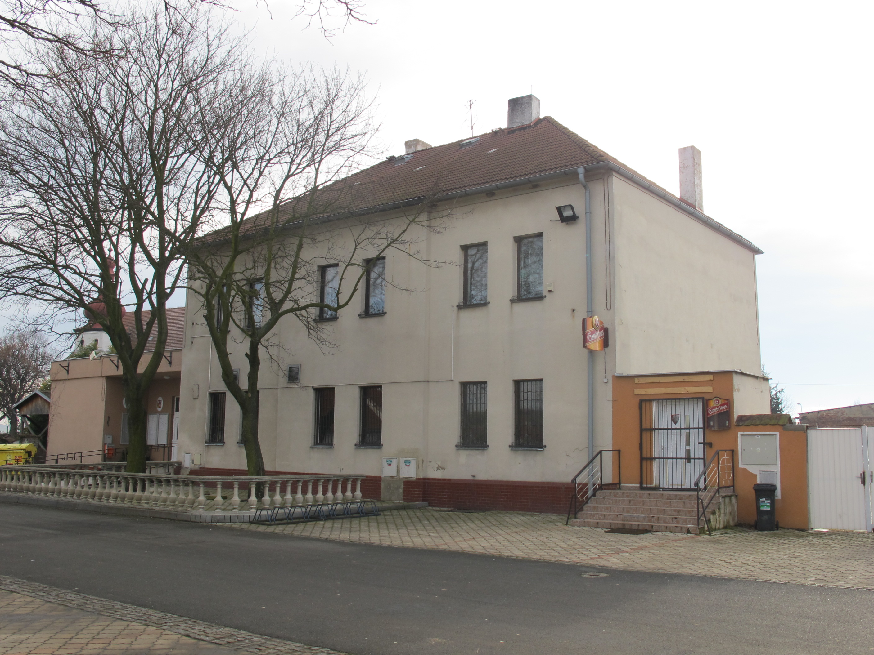 Obec Malé Březno (okres Most) - obecní úřad